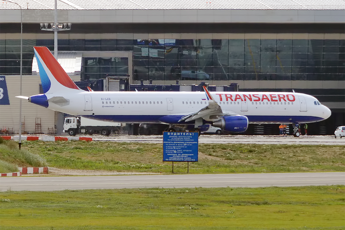 Transaero, EI-LED, Airbus A321-211